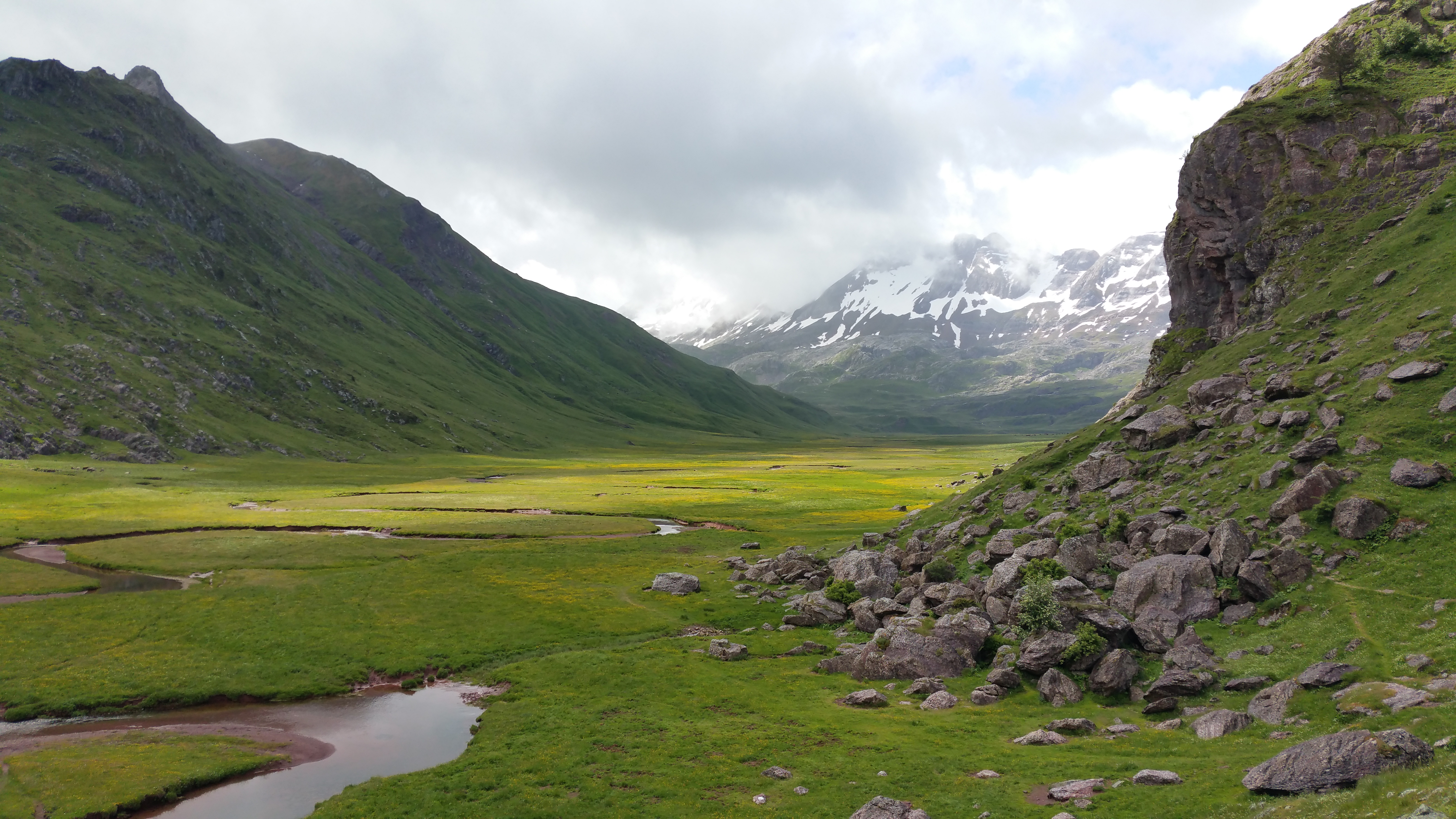 Aguas Tuertas, en el Pirineo oscense.